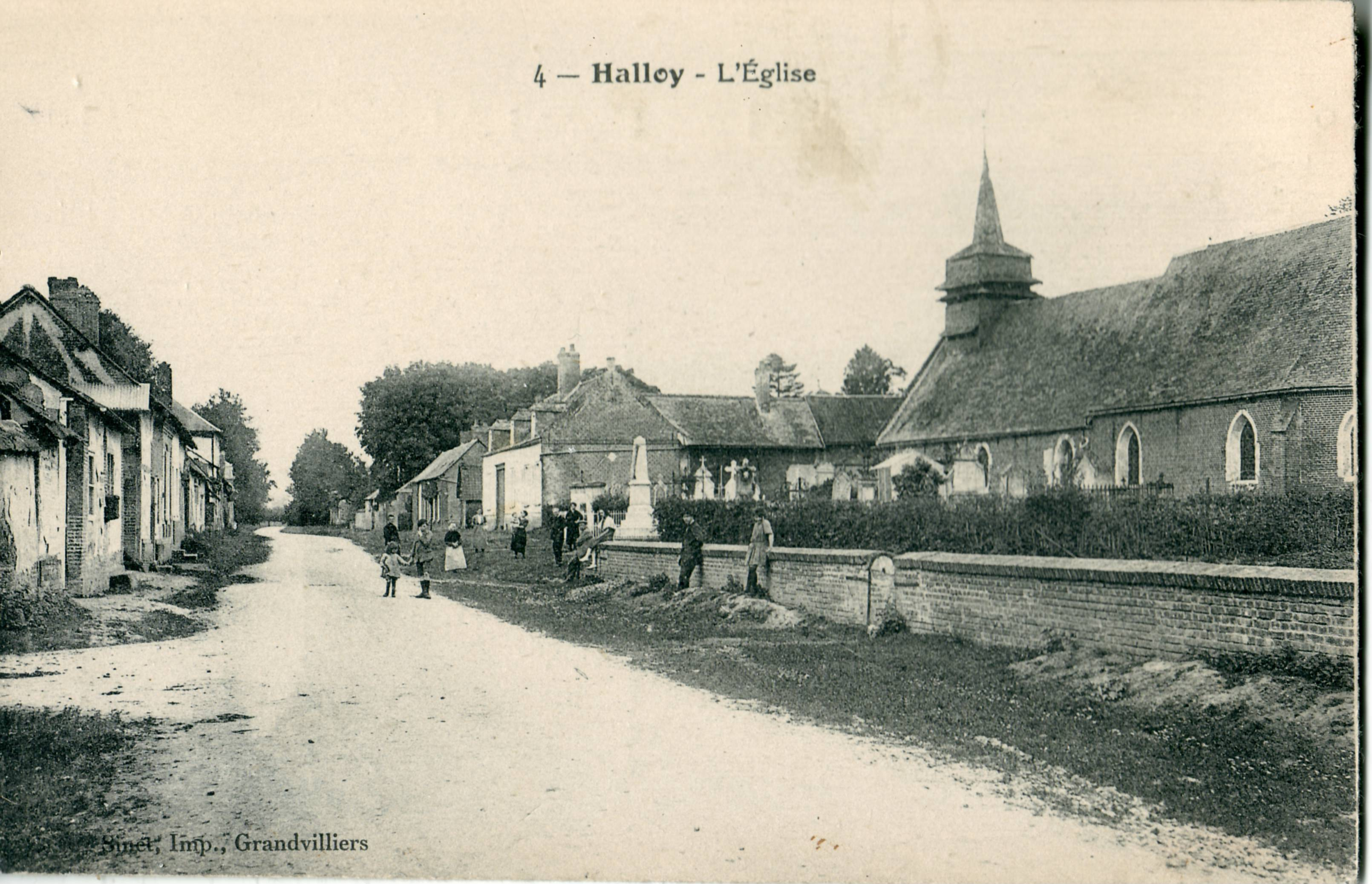 Carte postale ancienne éditée par Sinet, N°4 Halloy (Oise) : L'Église